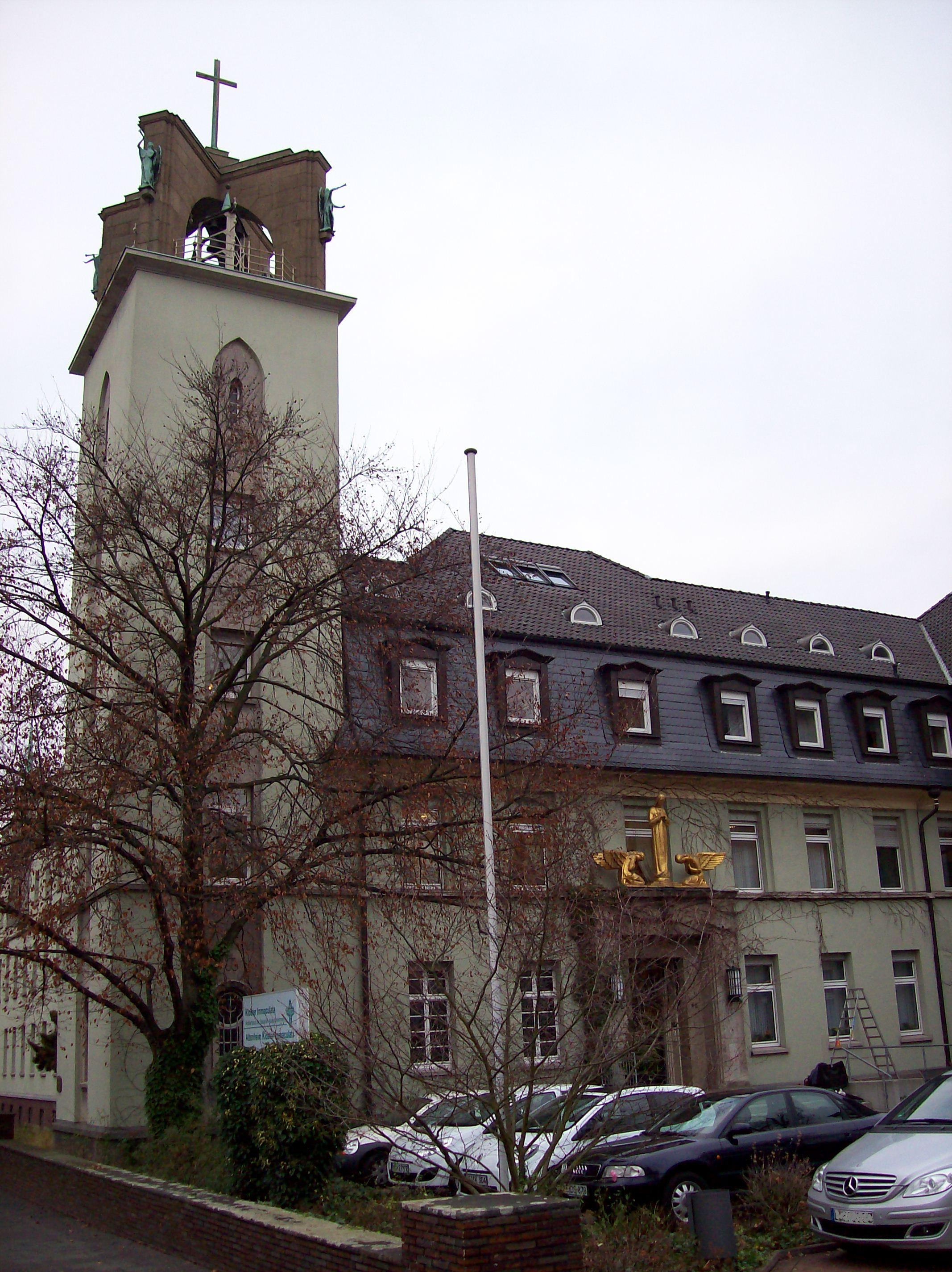 Kloster Immaculata (Neuss), Germany